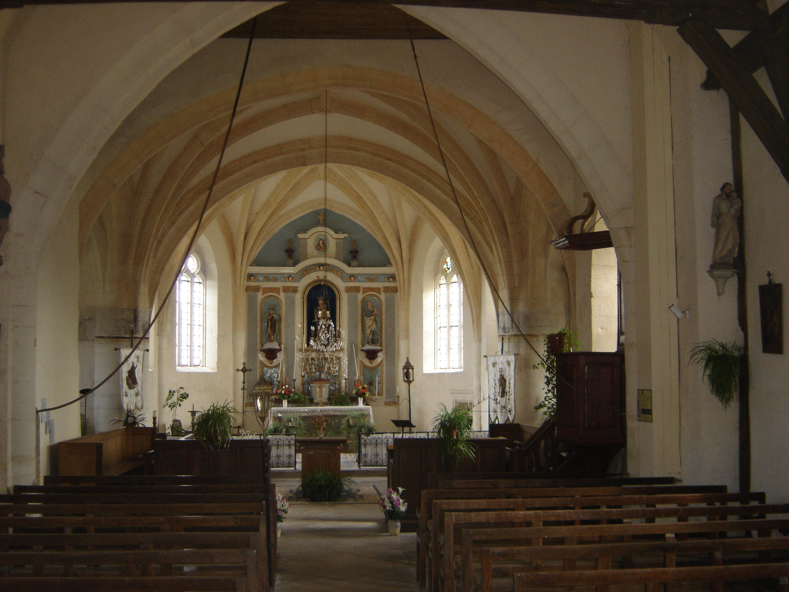 église Notre Dame de l'Assomption - Chauffour-lès-Bailly - Aube - France